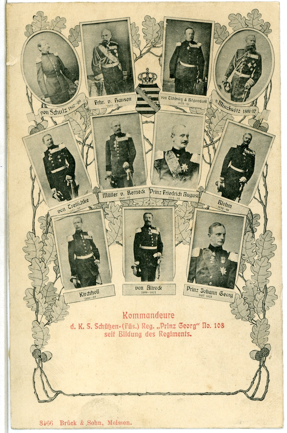 Kommandeure des Königlich Sächsischen Schützen-Regiment Prinz Georg 108 This postcard is from publisher Brück & Sohn in Meißen ( postcard has a unique number 03466 and is available in a higher resolution at the publisher. This images was uploaded in a cooperation project between Wikipedians and the publisher.